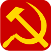 ritoccata la falce e il martello